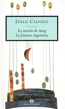 La formica argentina La nuvola di smog Italo Calvino